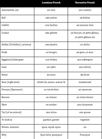 A small list of common Louisiana French words different from normative French.